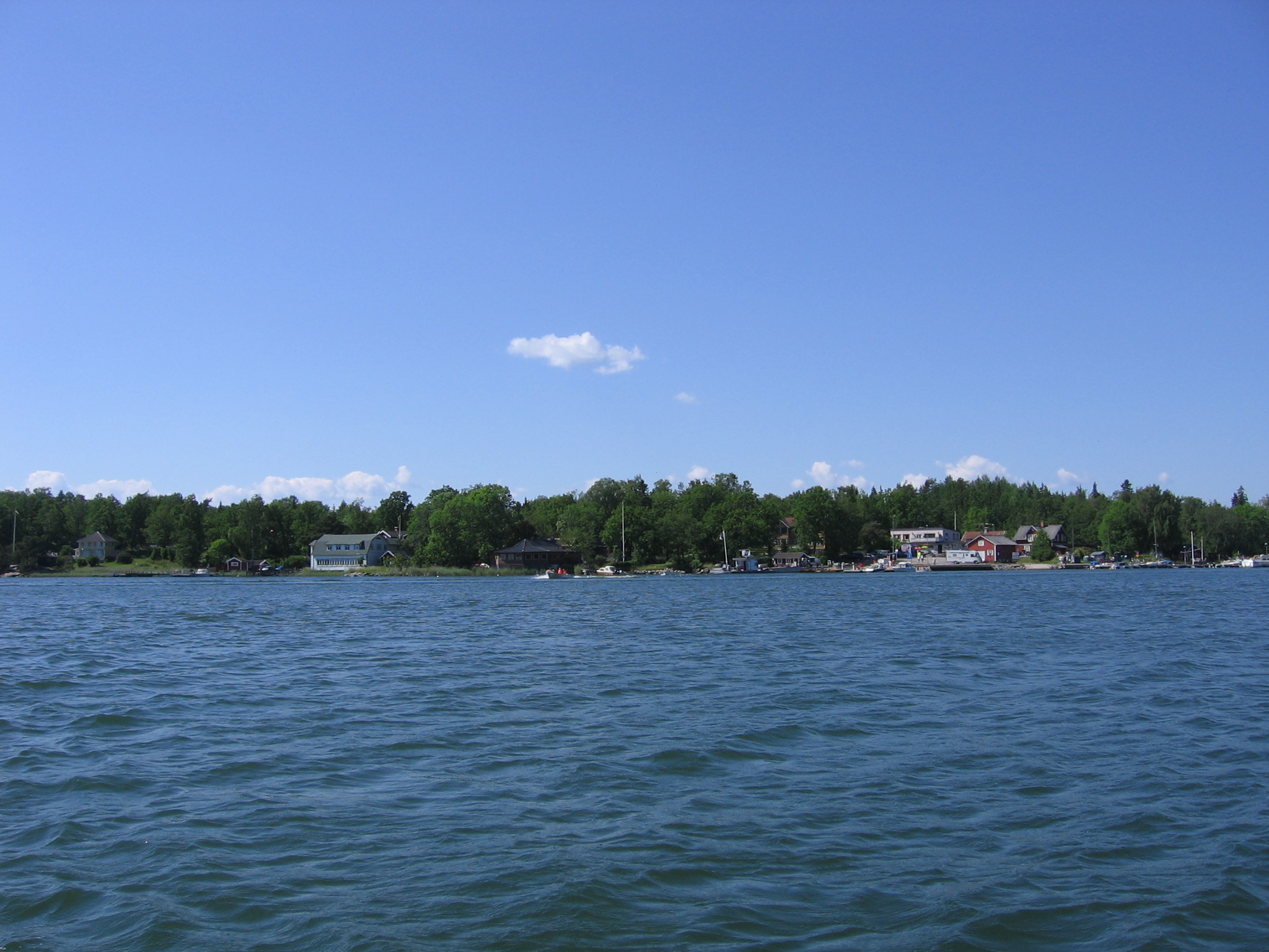 Spillersboda brygga i mitten av bilden. Till vänster syns det f. d. pensionatet i vitt, därefter dansstället Terassen i brunt.